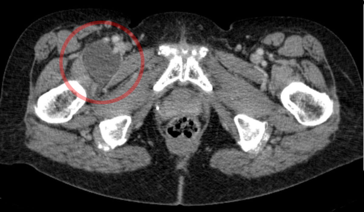 Deutlich vergrößerte Bursa iliopectinea rechts (links im Bild) in der Computertomographie.